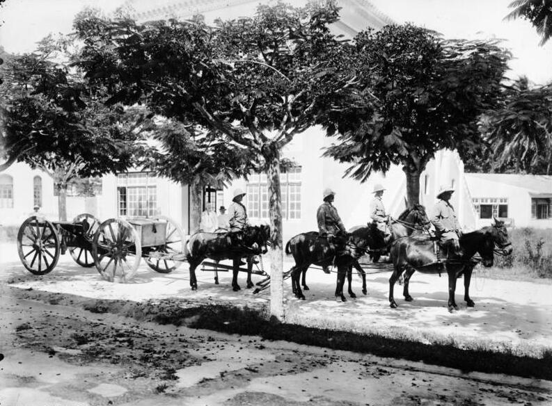 Artillerie fährt durch die Stadt